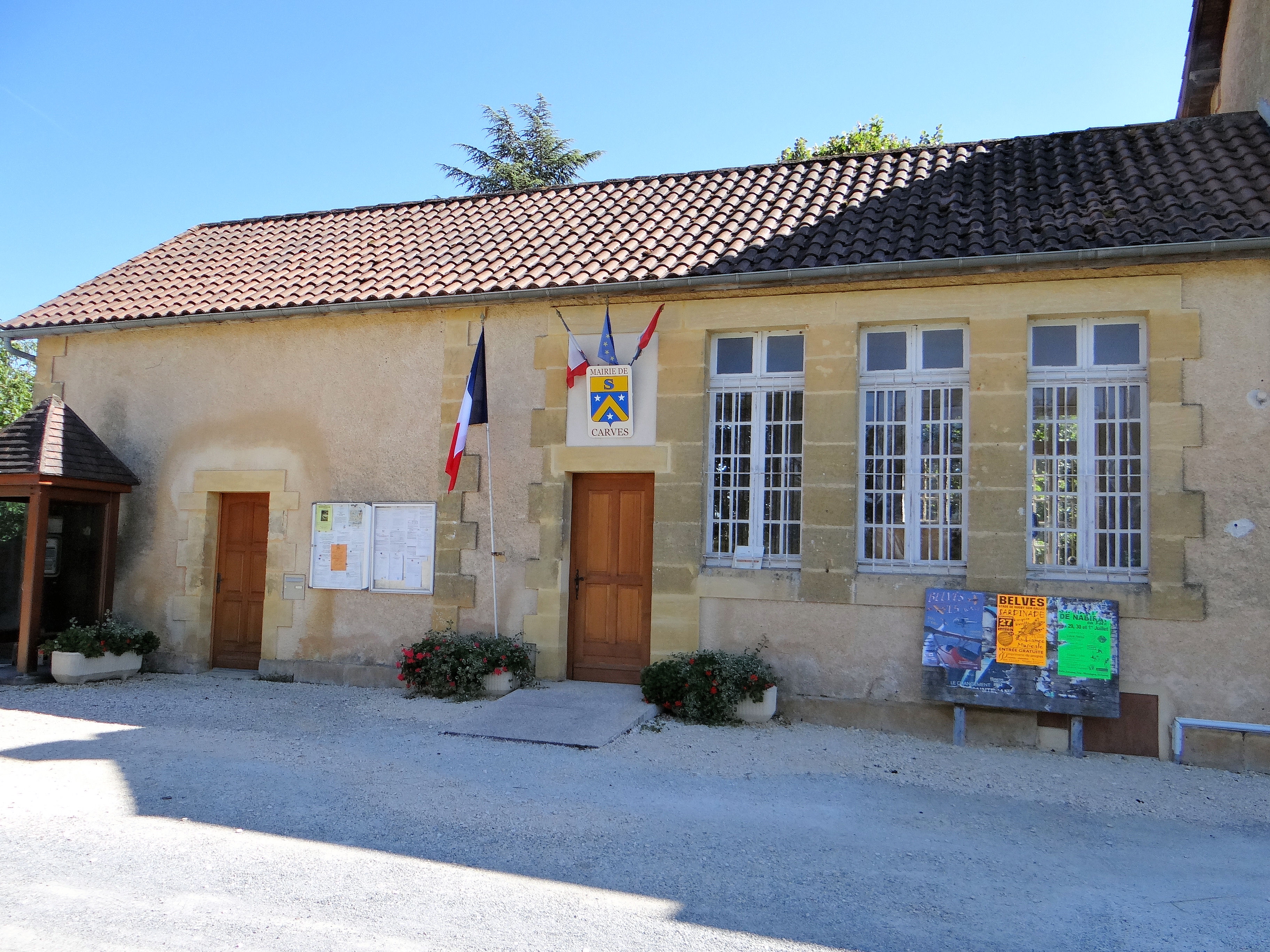 Mairie de Carves dans l'ancienne école